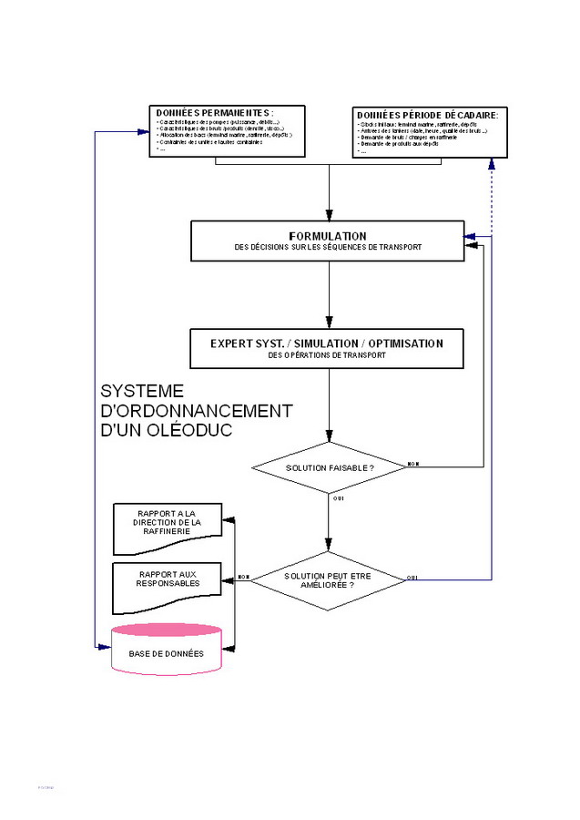 Ce shéma représente un système d'ordonnancement automatique par ordinateur d'un oléoduc standard.